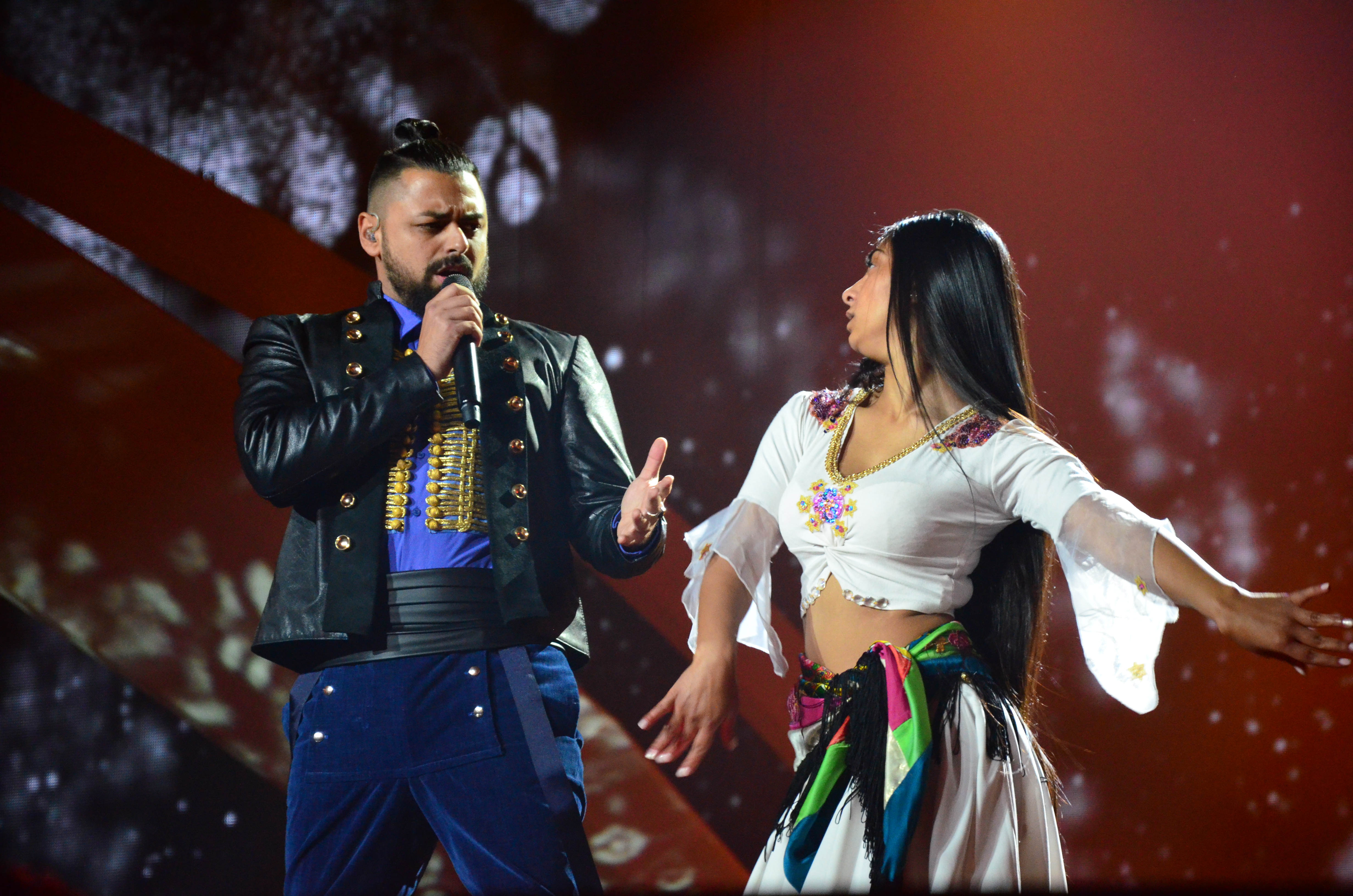 10 травня 2017 року у Києві відбулась генеральна репетиція 2 півфіналу "Євробачення".